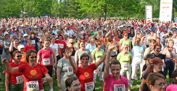 Nicerun 2007 - naisten juoksutapahtuma